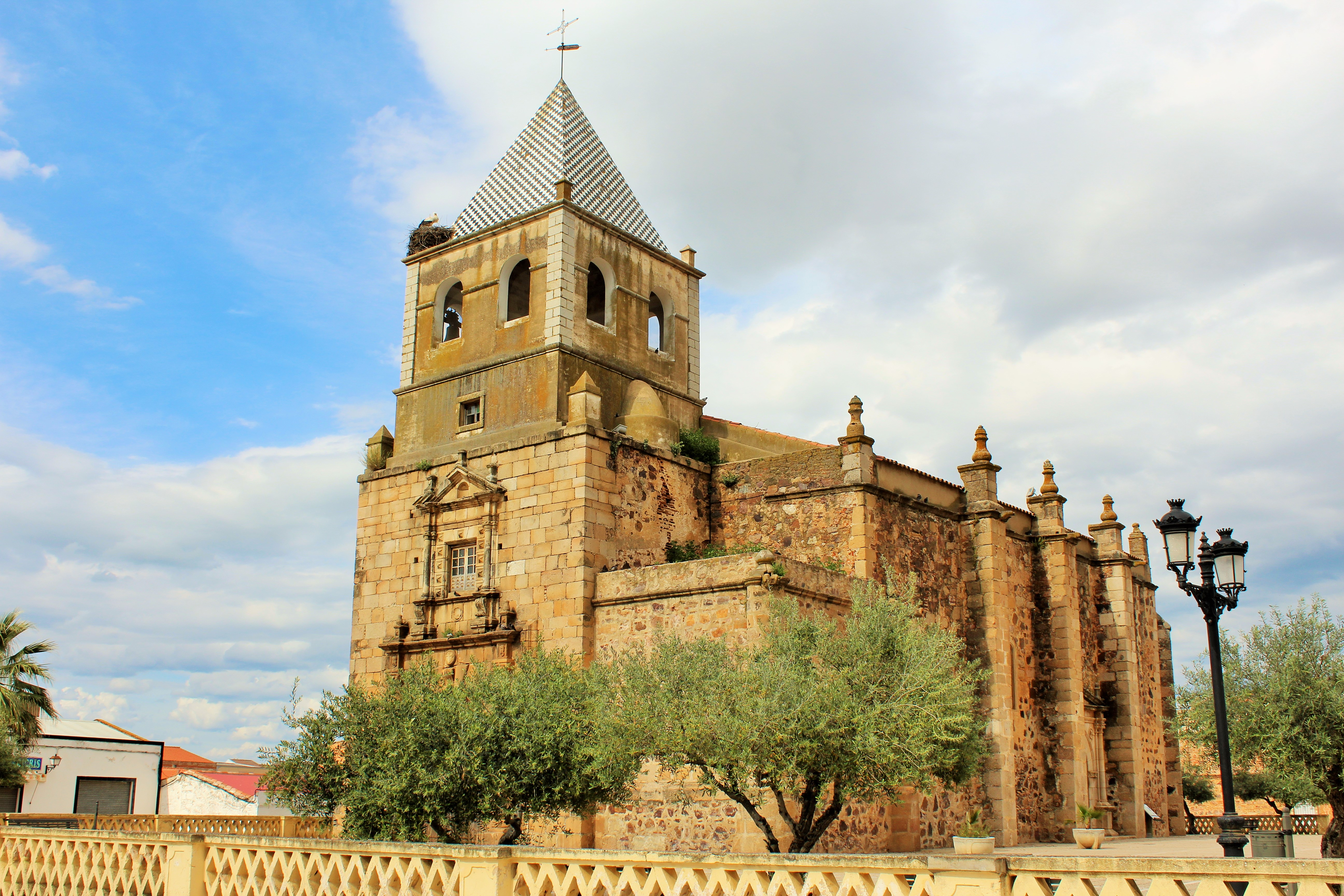 Vista general de la Iglesia parroquial